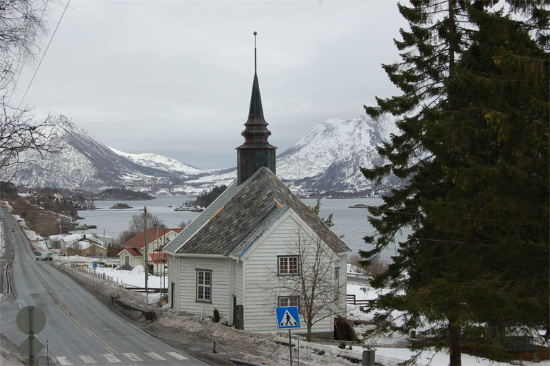 Die Leikanger Kirke in der Ortschaft Leikong in der Gemeinde Herøy.